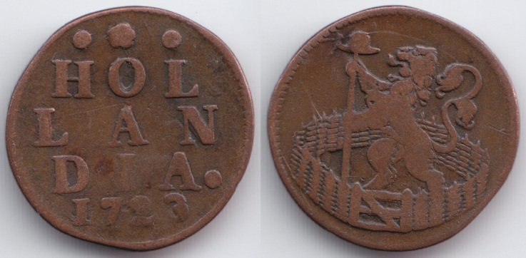 Монета 1 дуит, 1723 год, Нидерланды, Голландия. Диаметр 22 мм, вес 3.05 гр.